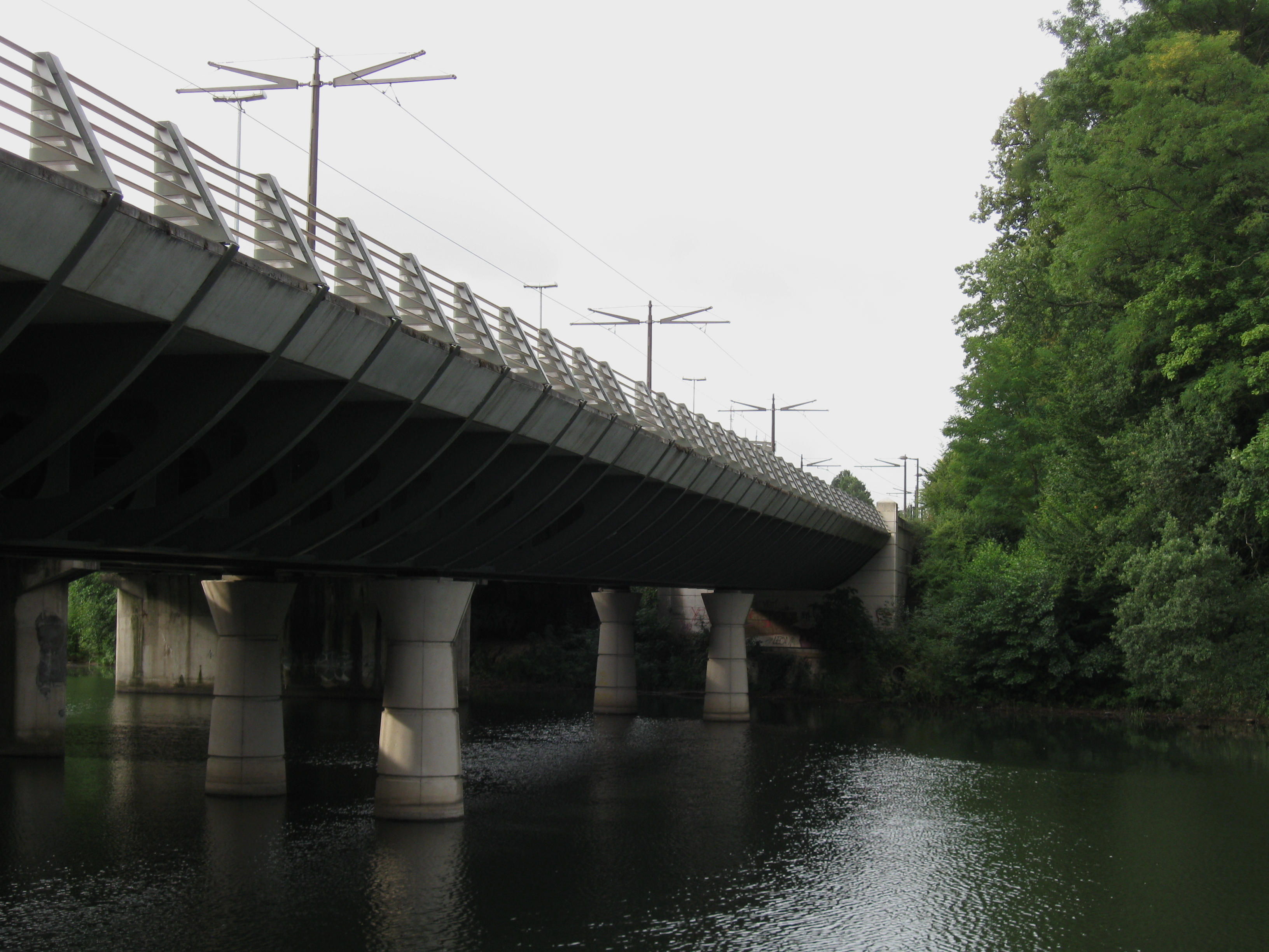 Pont sur le Loiret du tramway d'Orléans, Olivet, Loiret, France